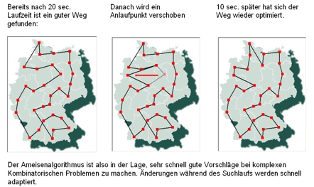 Screendumps eines Laufs Traveling Salesman mit ACO